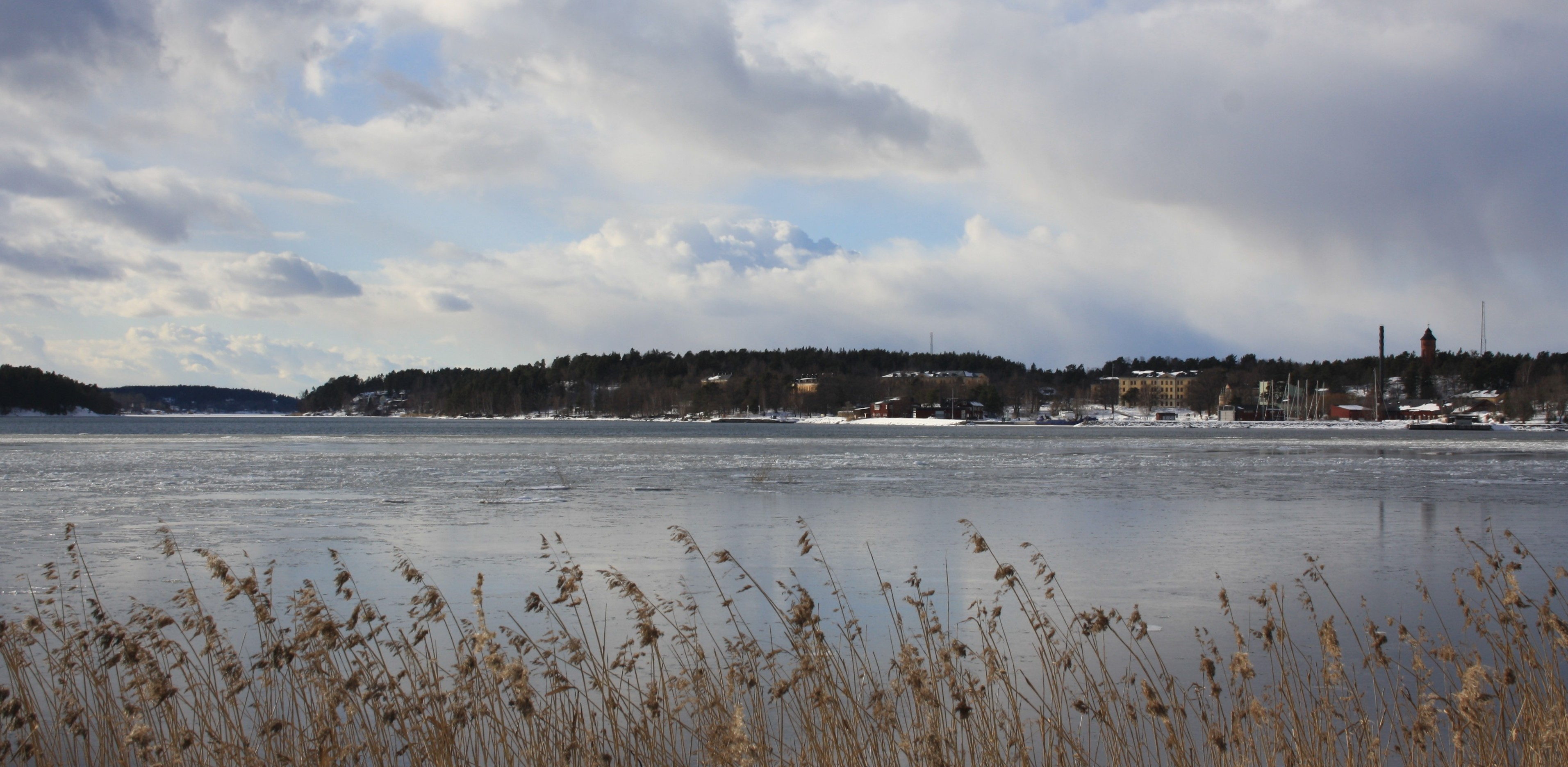 De f d militära anläggnigarna på Rindö, sett från Värmdölandet, mars 2010.